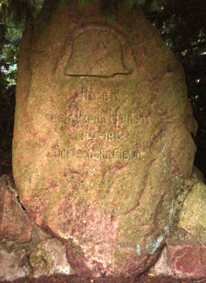 Gedenkstein der Opfer des 1. WK der "Dorfschaft Cleve"